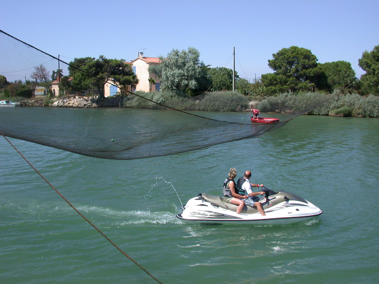 Le filet du Globe